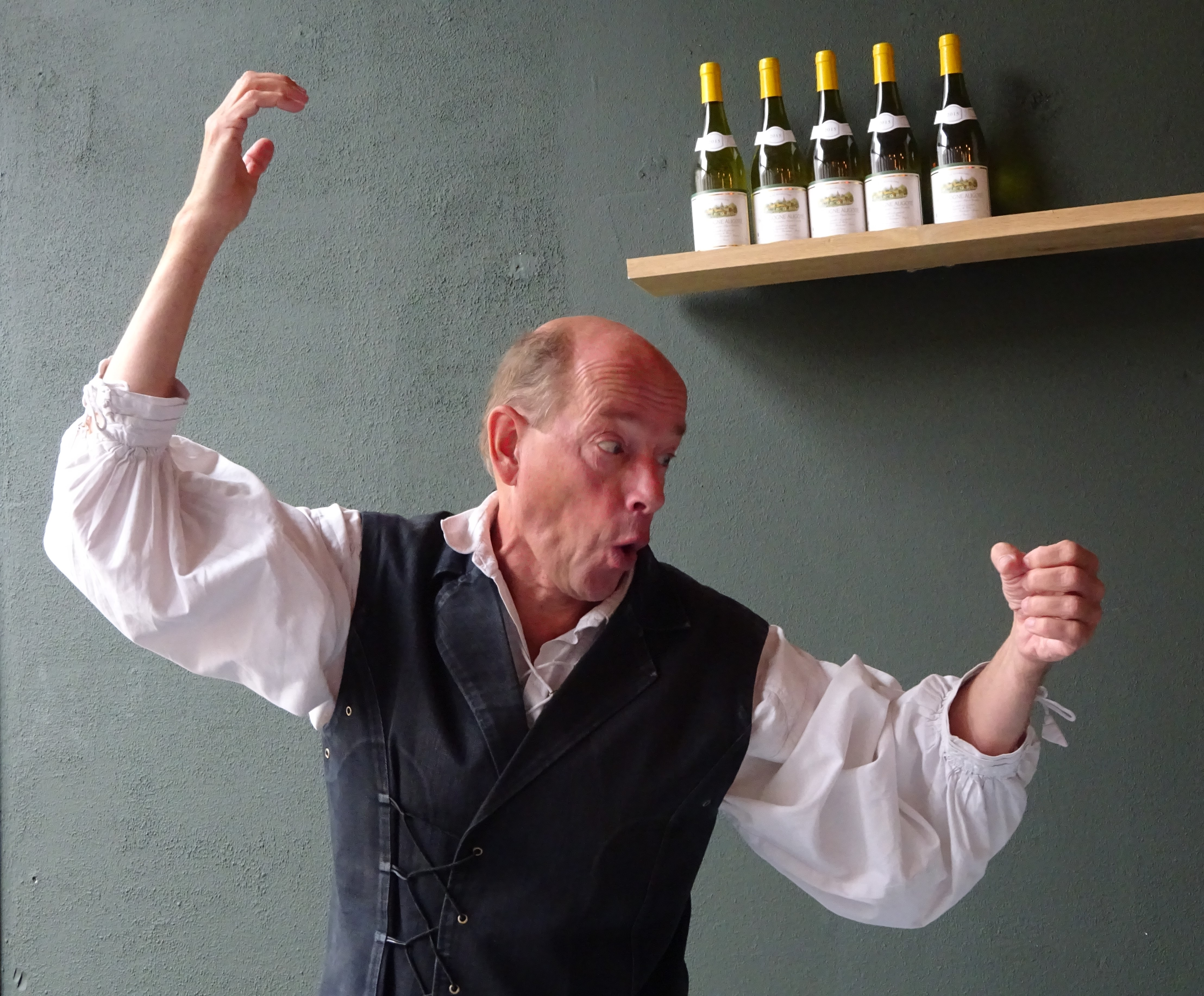 Eric Borrias in Tiel, 2 juli 2017